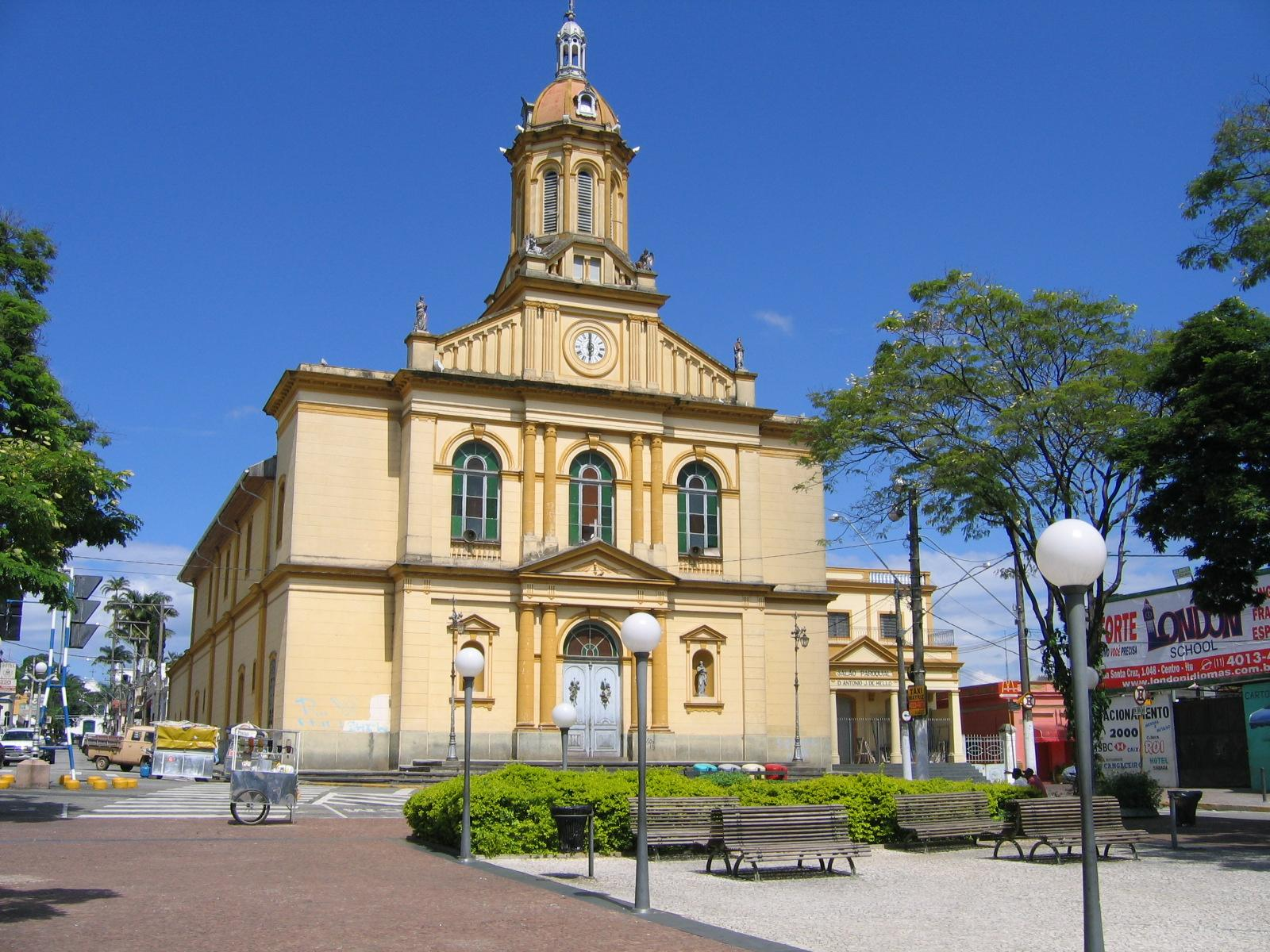 Igreja matriz de Itu